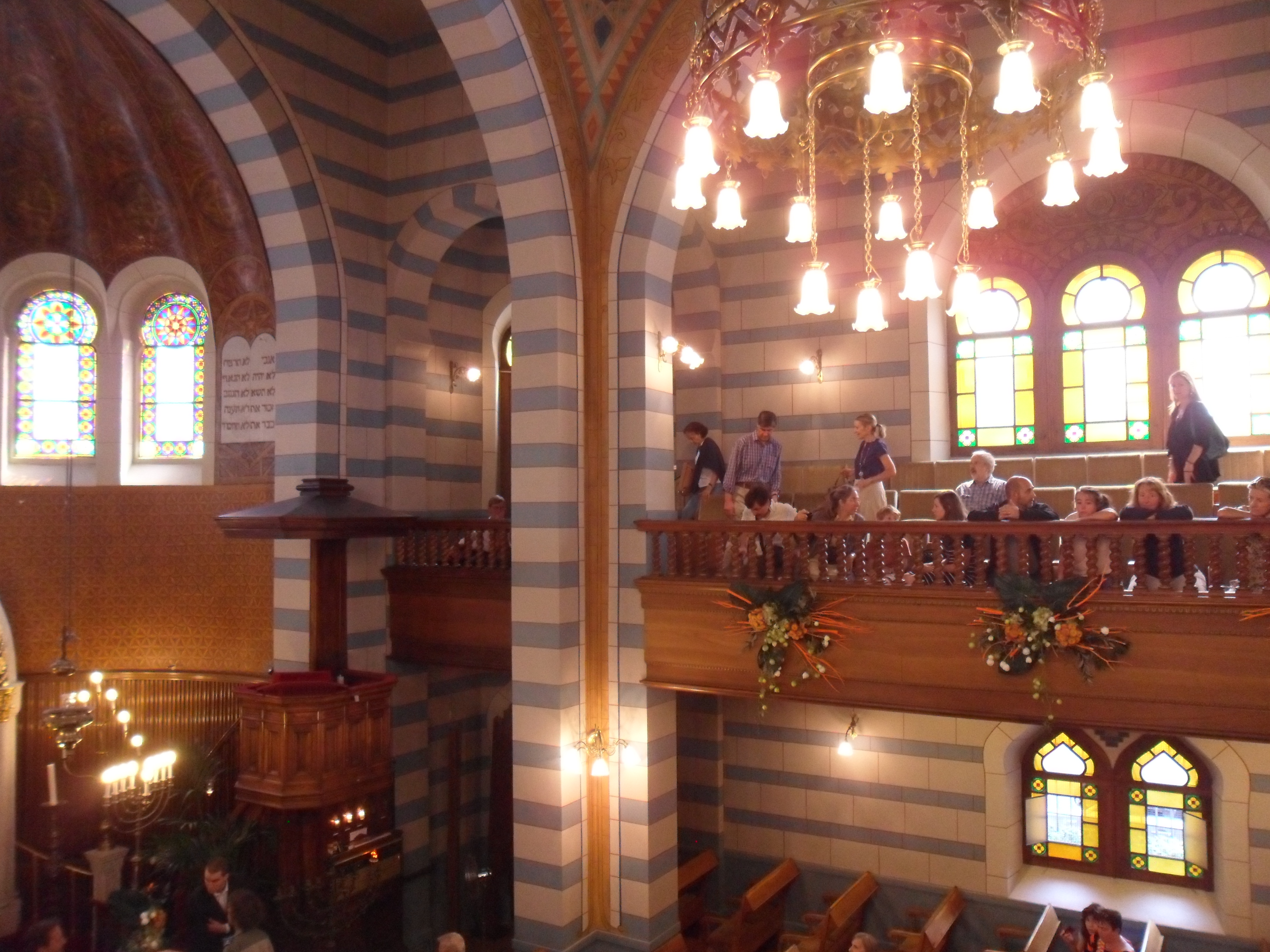 Intérieur de la synagogue Beth Yaacov vu depuis la terrasse nord